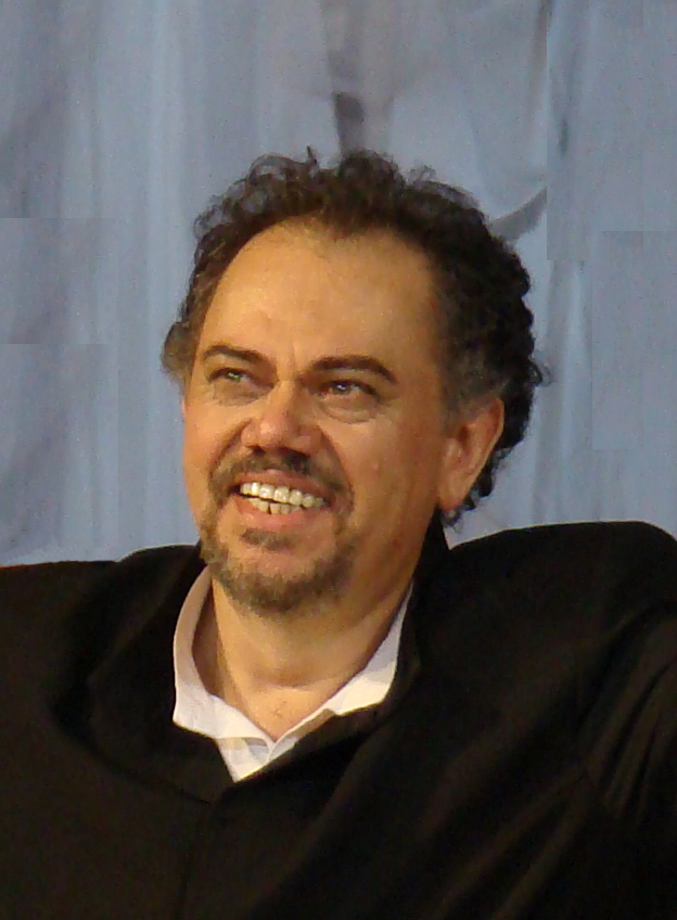 Alexandru Agache